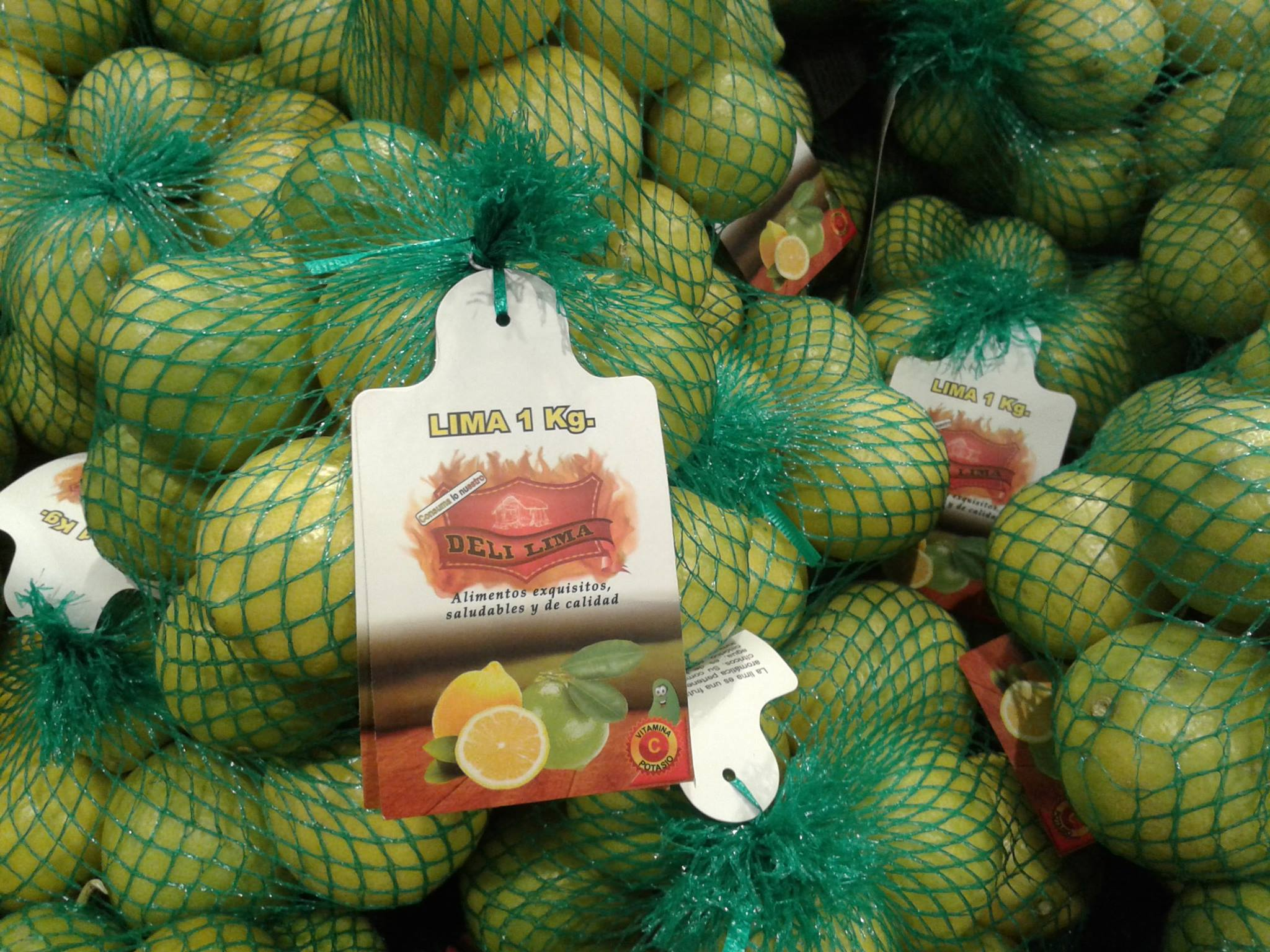 ليما Lima الإكوادوري الخالي من الحموضة تماماً والمائل إلى الحلاوة